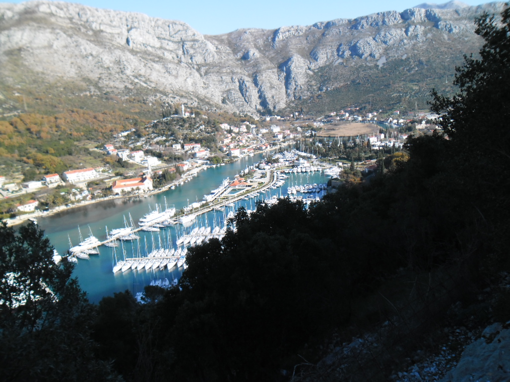 ACI Marina Dubrovnik